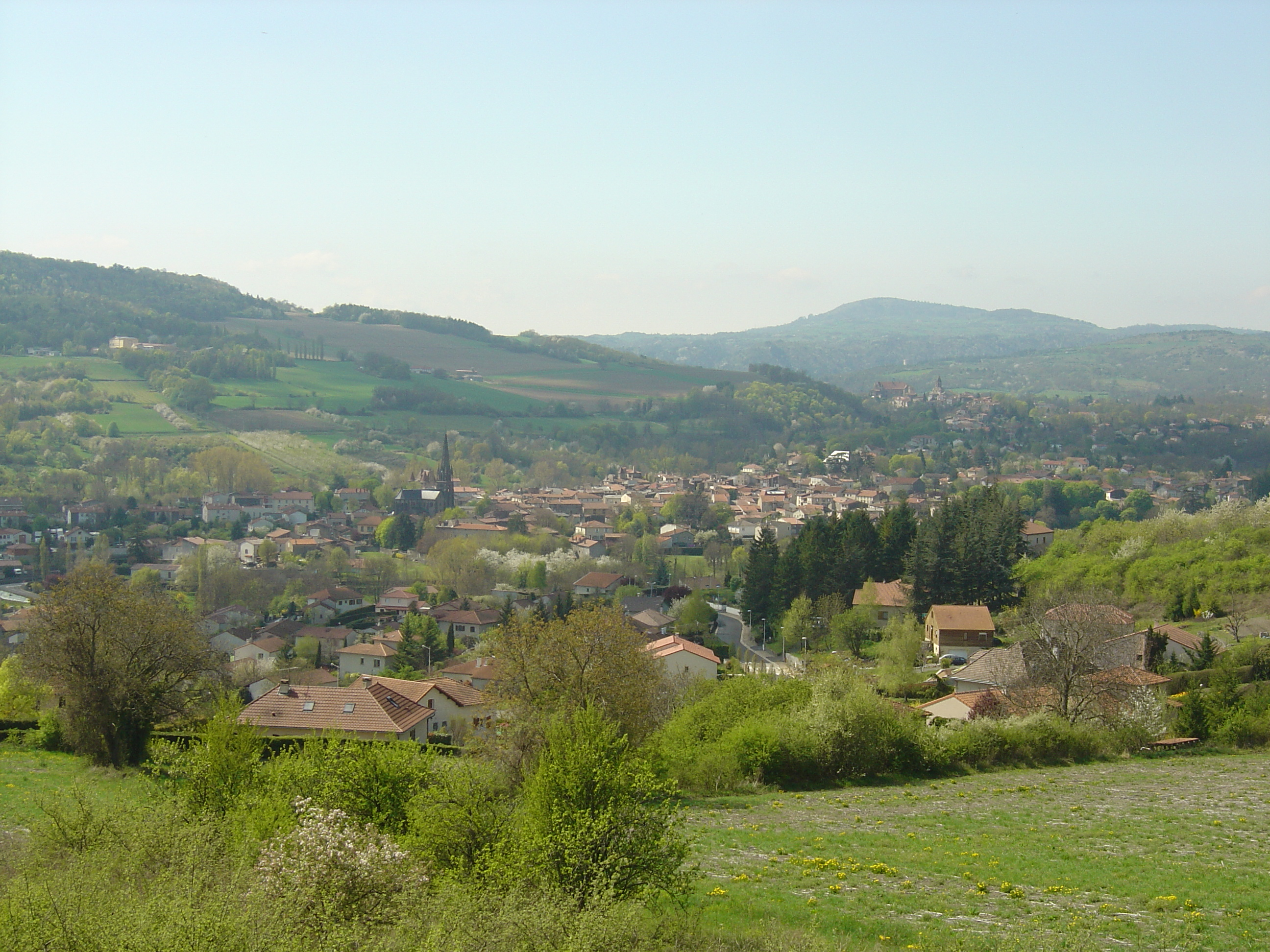 Vue générale de Saint-Amant Tallende (Auvergne- Puy-de-Dôme)